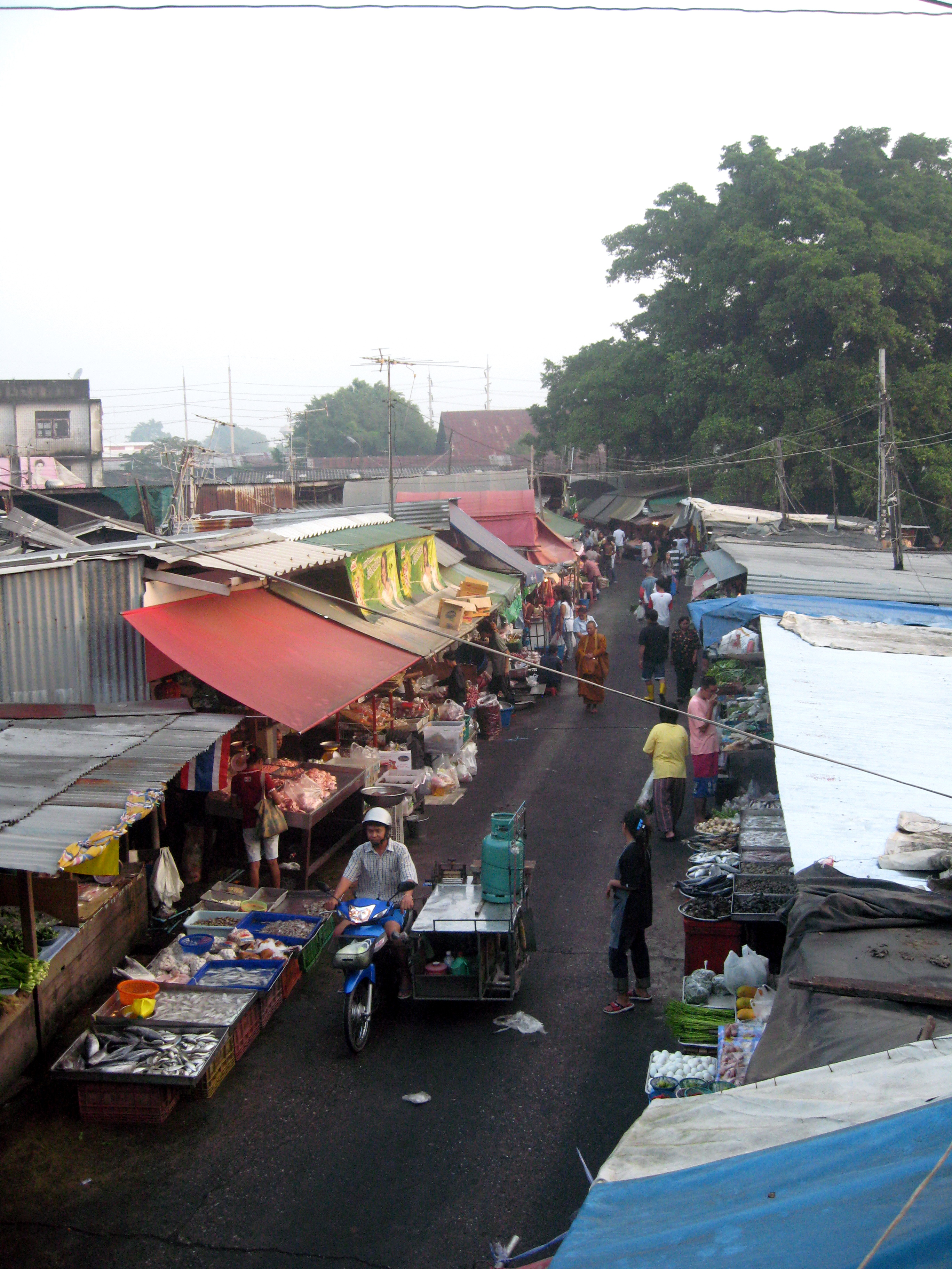 ตลาดเช้าหัวตะเข้